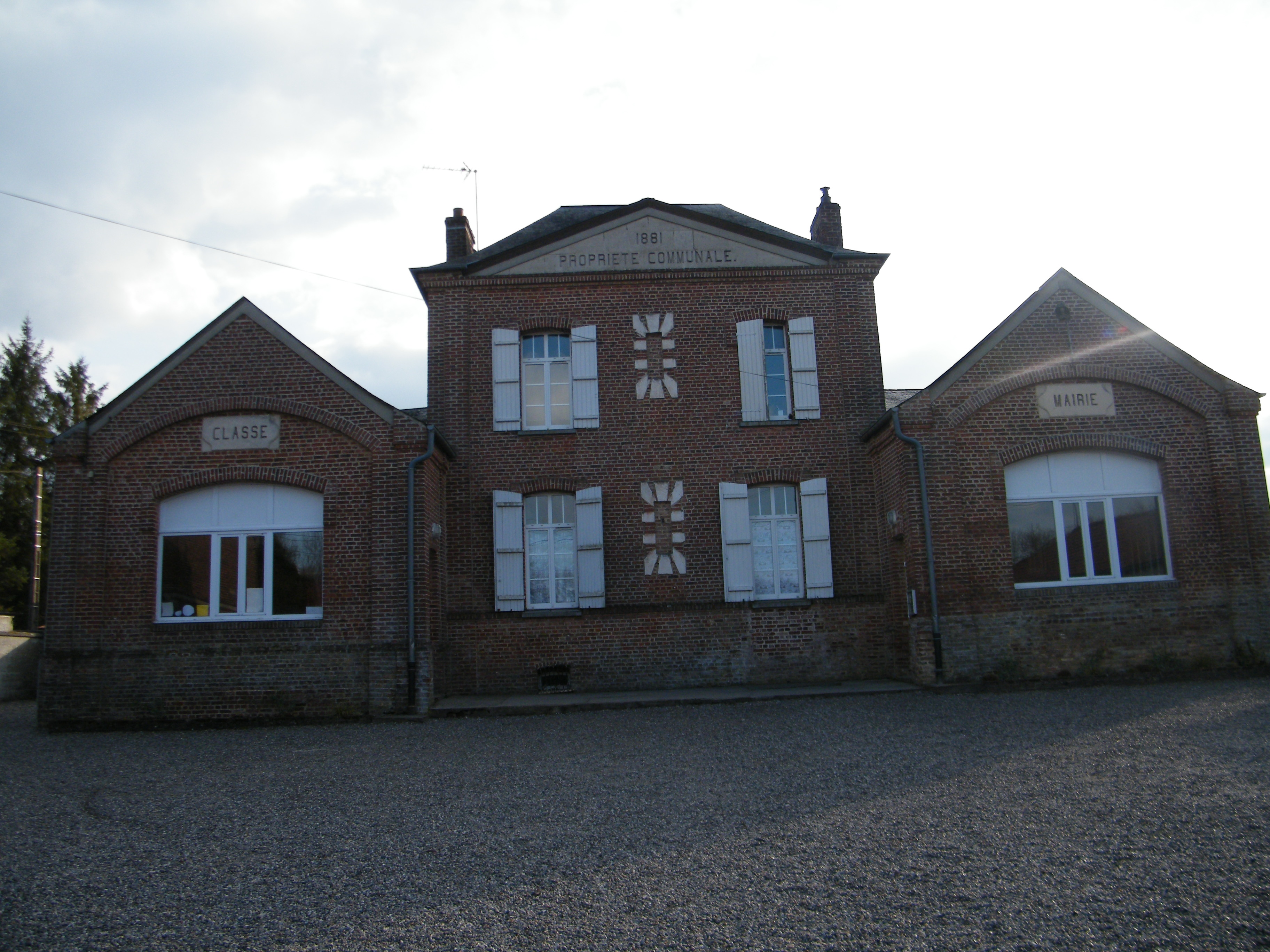 Bâtiments communaux : mairie-école.